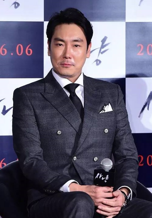 Cho Jin-woong at news conference of movie 사냥